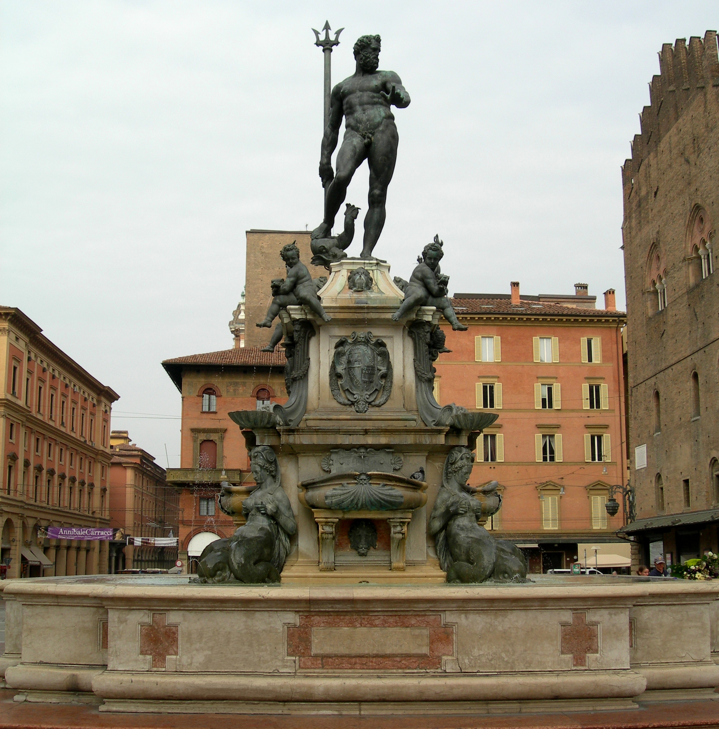 Fontana del Nettuno